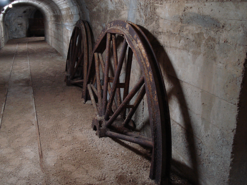 Pozzo Impero - Parco Tecnologico Archeologico delle Colline Metallifere Grossetane